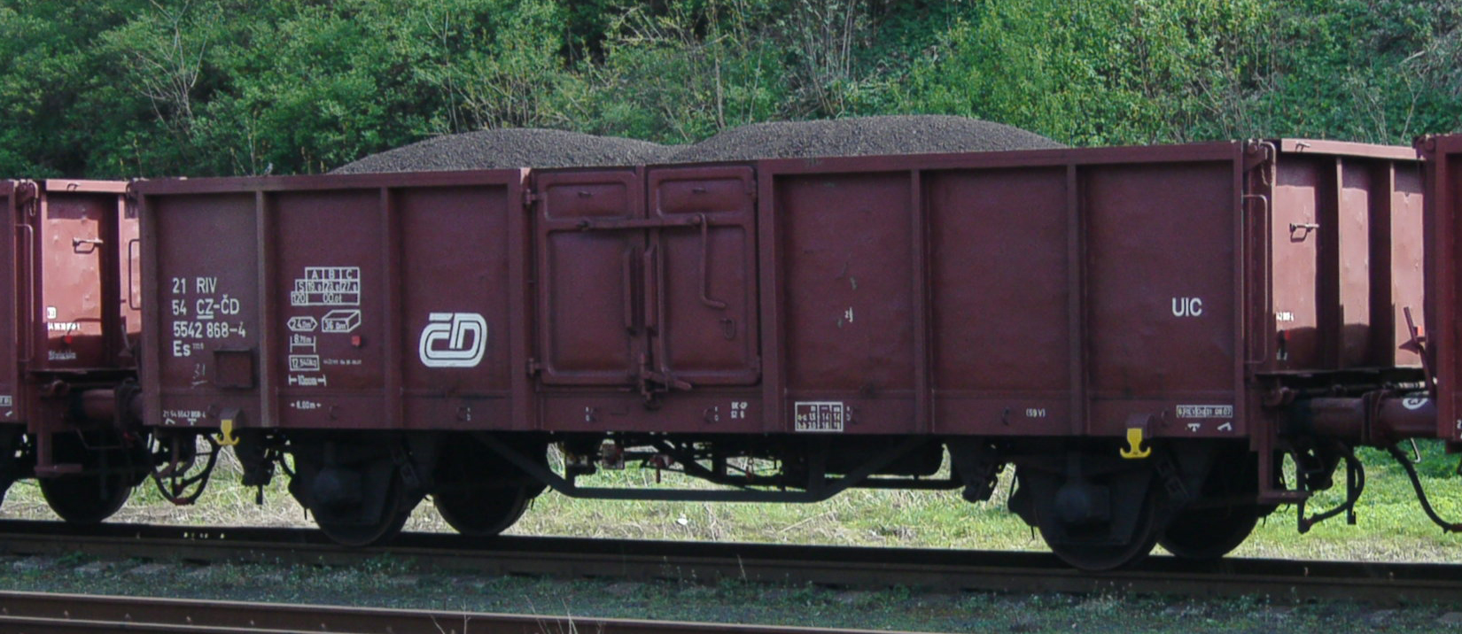 Offener Güterwagen, Gattung Es (ČSD alte Gattung Vte), entsprechend dem UIC-Typ 2 für zweiachsige E-Wagen. Aufgenommen im Bahnhof Raspenava.